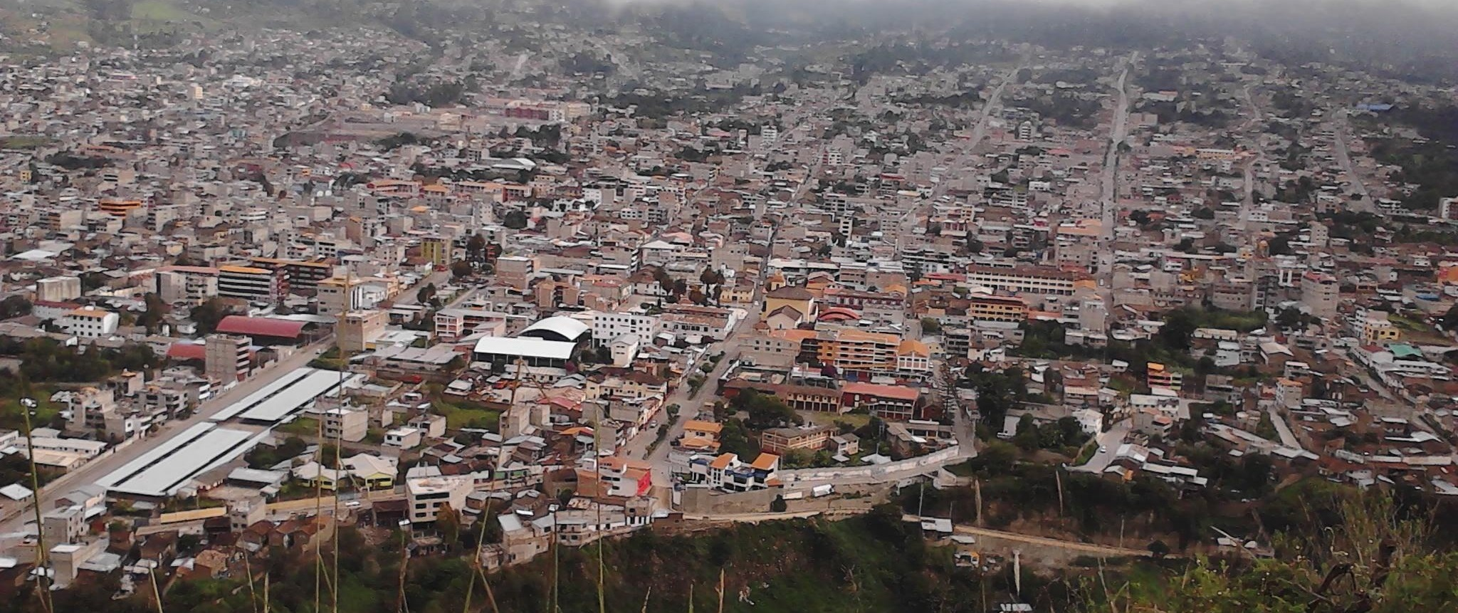 Vista panorámica de Abancay